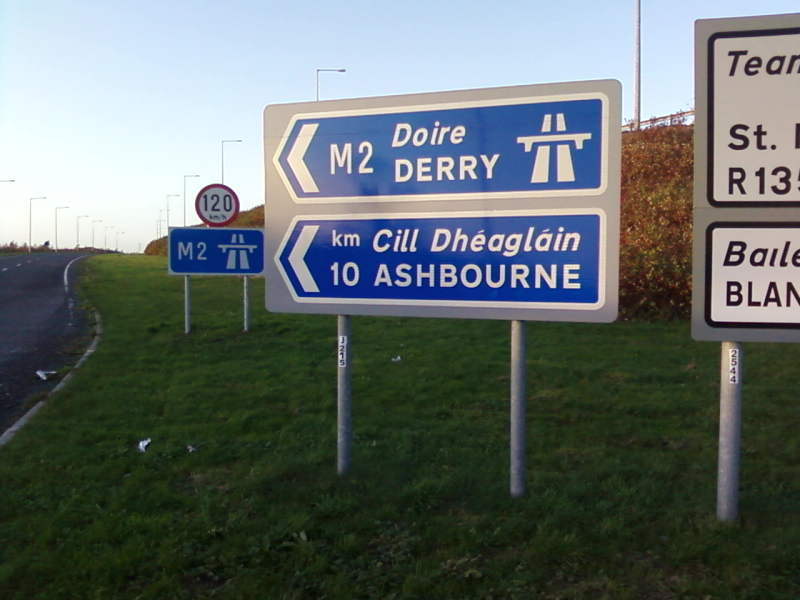 Dálniční ukazatele u Kilkshane